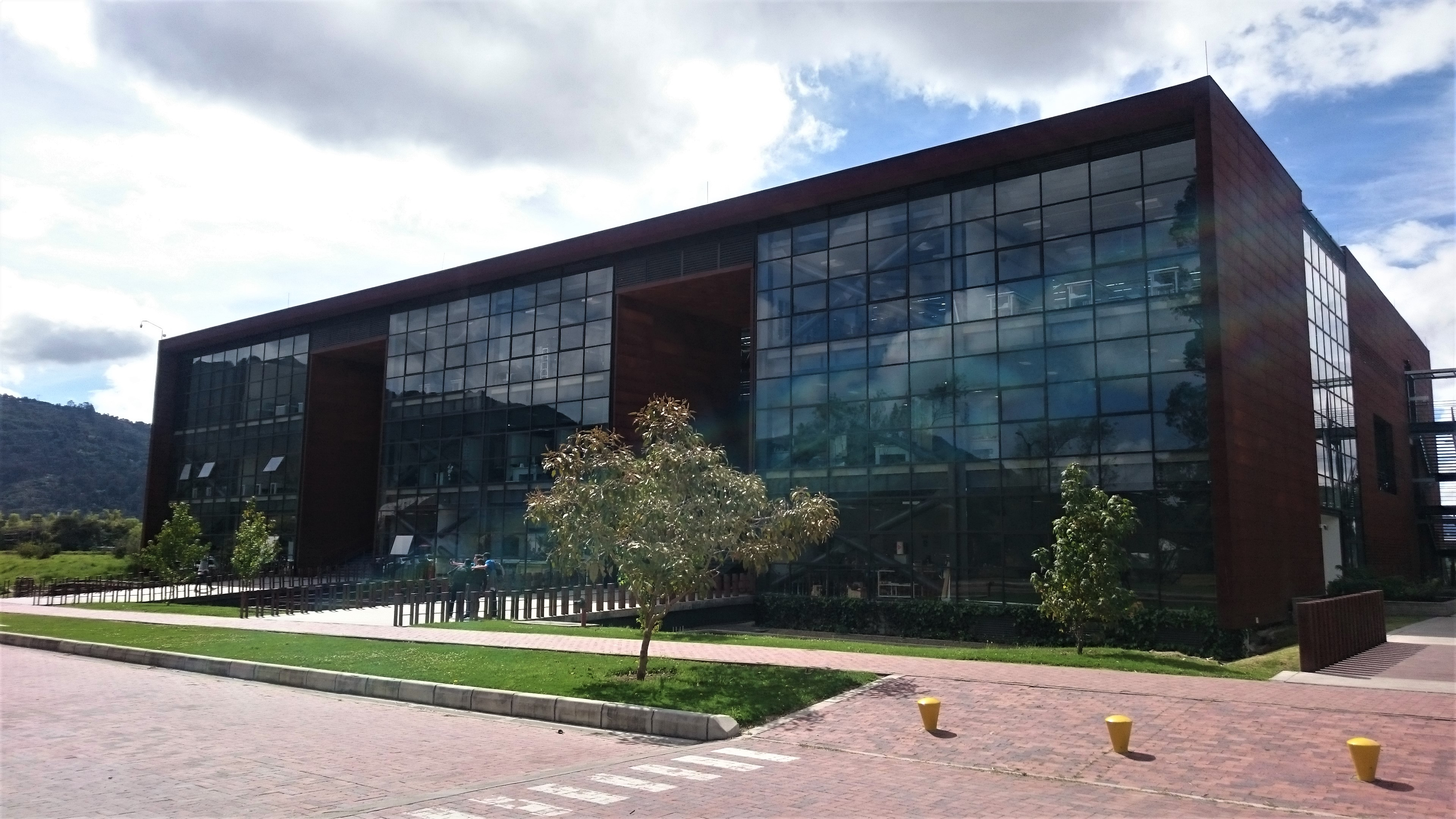 Bloque I de la Escuela Colombiana de Ingeniería